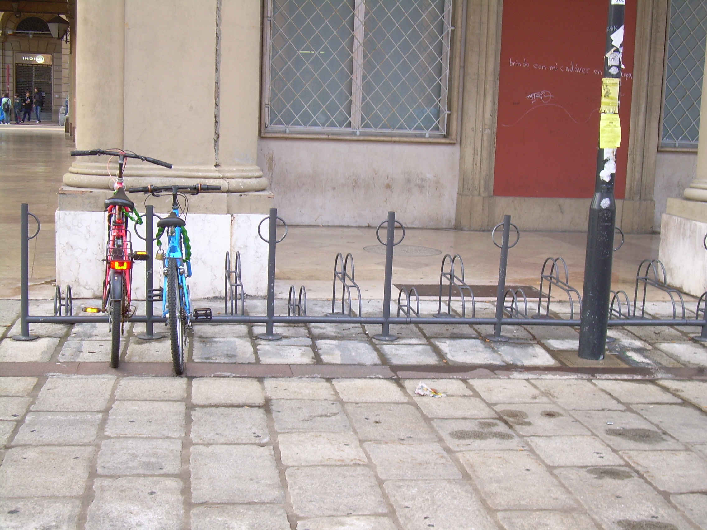 Rastrelliera per biciclette a Bologna, via Galliera.